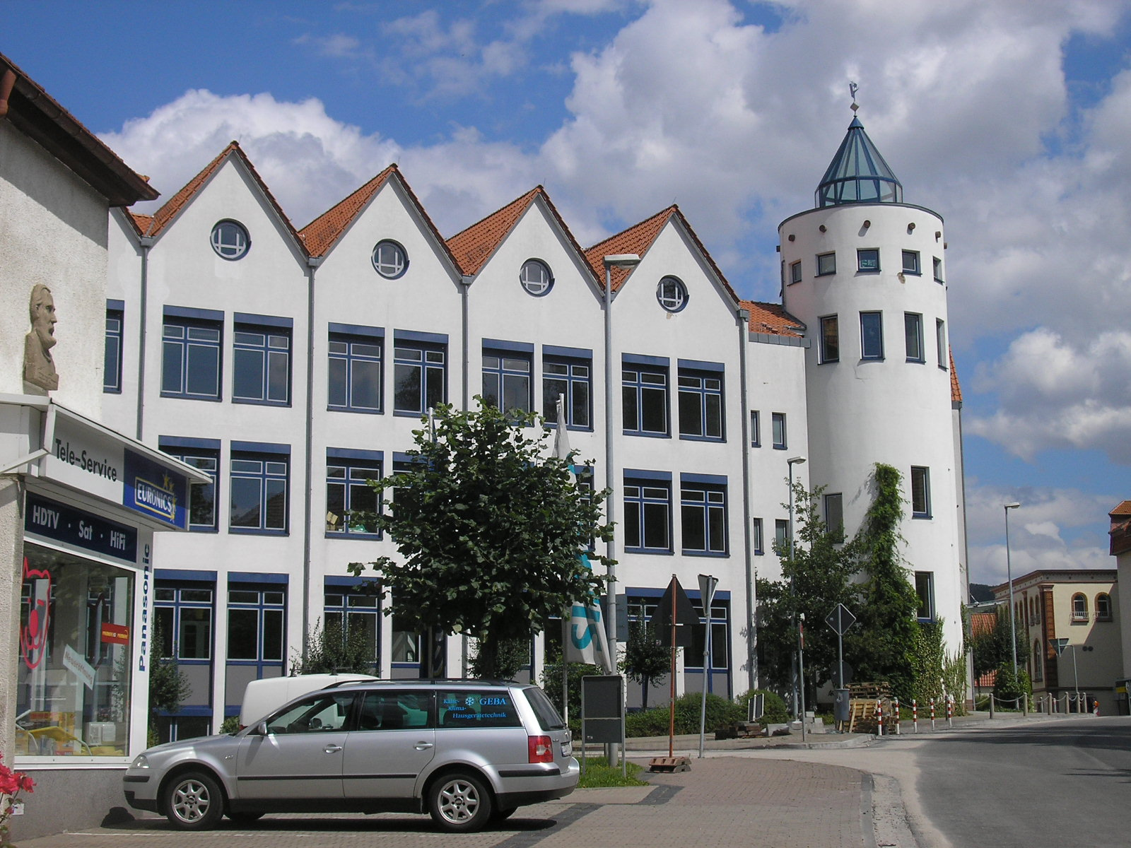 Das katholische Gymnasium in Heiligenstadt (Thüringen).